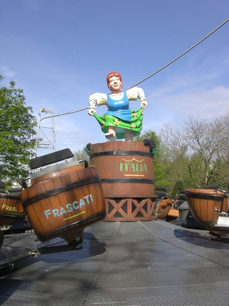 Cilindri Rotanti , breakdance à Walibi Belgium .